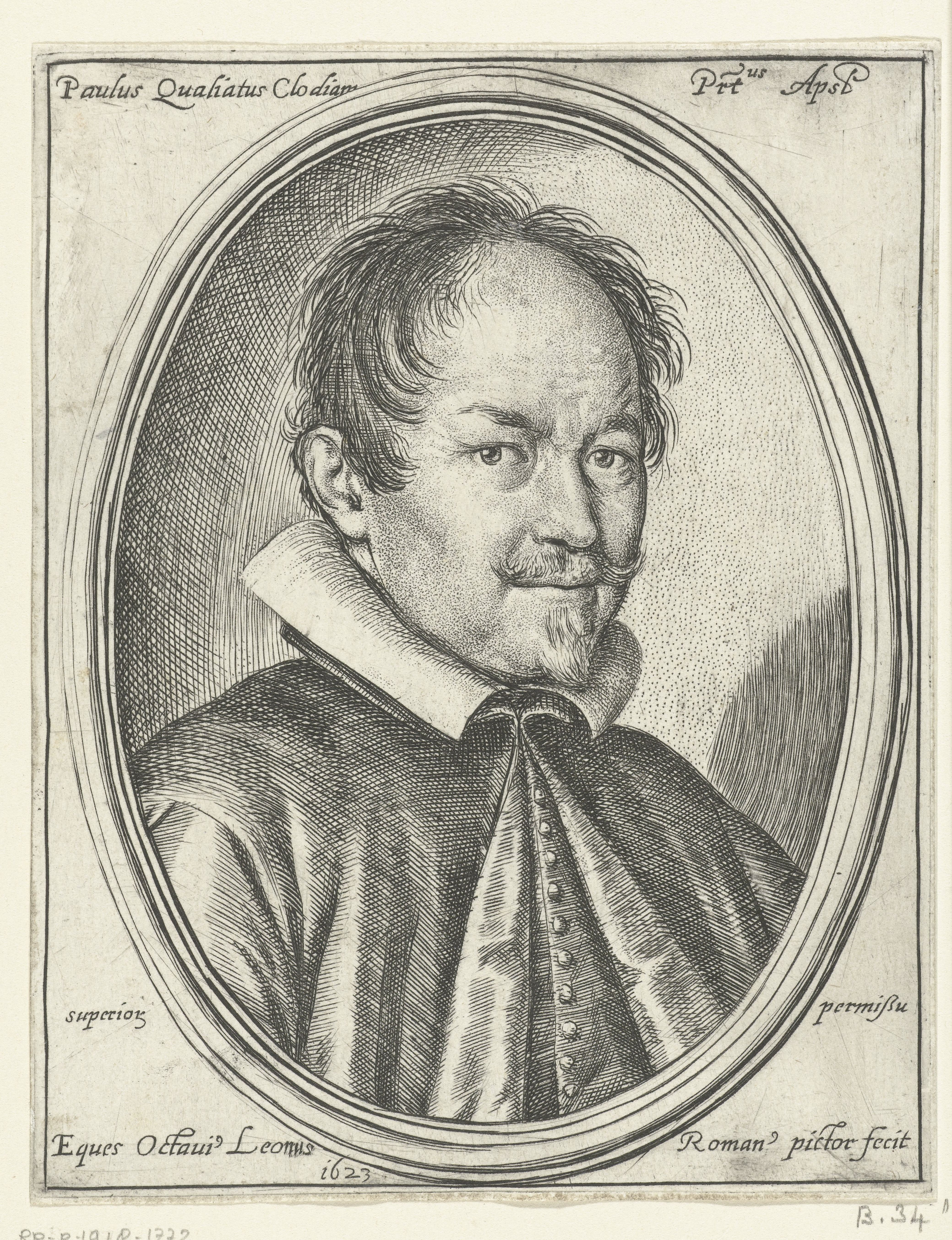 IdentificatieTitel(s): Portret van Paolo QuagliatiPaulus Qualiatus Clodiam Prt.us Apsl (titel op object)Objecttype: prent Objectnummer: RP-P-1918-1772Catalogusreferentie: The Illustrated Bartsch 34Opmerking: tweede staatOpschriften / Merken: verzamelaarsmerk, verso midden, gestempeld: Lugt 2233Omschrijving: Portret van de componist Paolo Quagliati.VervaardigingVervaardiger: prentmaker: Ottavio Mario Leoni (vermeld op object)naar eigen ontwerp van: Ottavio Mario LeoniPlaats vervaardiging: ItaliëDatering: 1623Fysieke kenmerken: ets en stippeletsMateriaal: papier Techniek: etsenAfmetingen: plaatrand: h 144 mm × b 113 mmToelichtingCollectie FrankenOnderwerpWat: portrait of composerWie: Paolus QuagliatiVerwerving en rechtenCredit line: Schenking van de heer C.P.D. PapeVerwerving: schenking 1918Copyright: Publiek domein